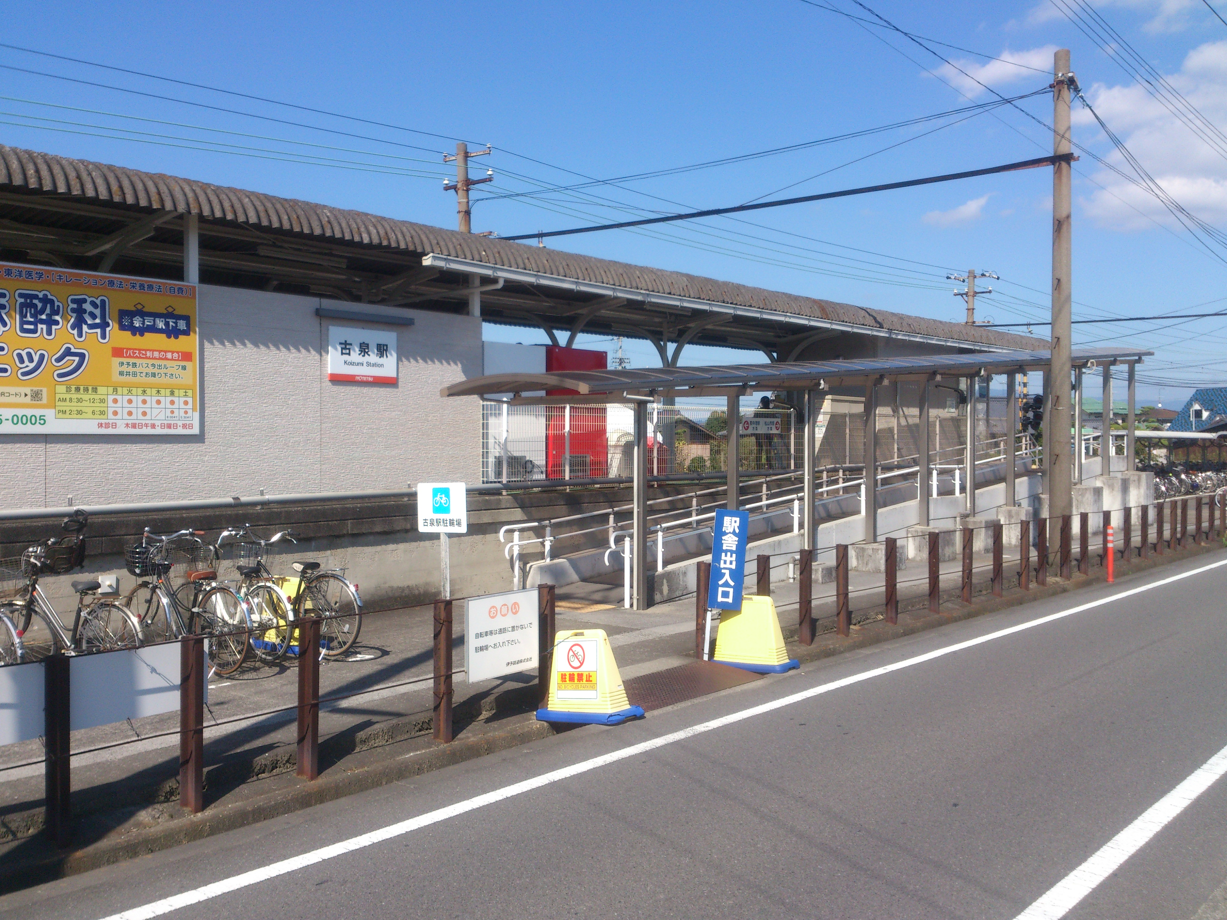 伊予鉄道 古泉駅です。